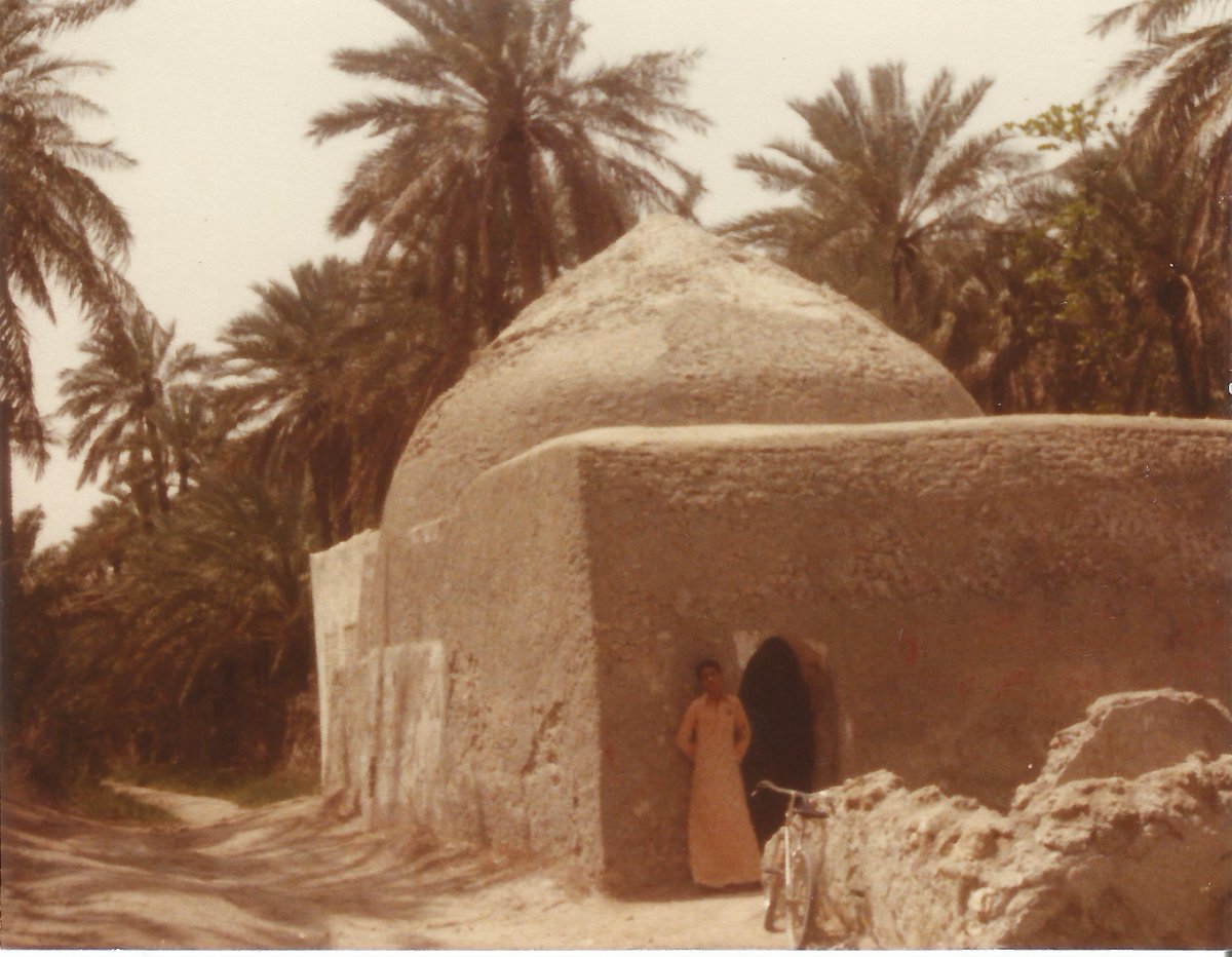 منظر خارجي لحمام أبو لوزة. وتظهر غابات النخيل تُحيطه. تاريخ الصورة غير معروف.